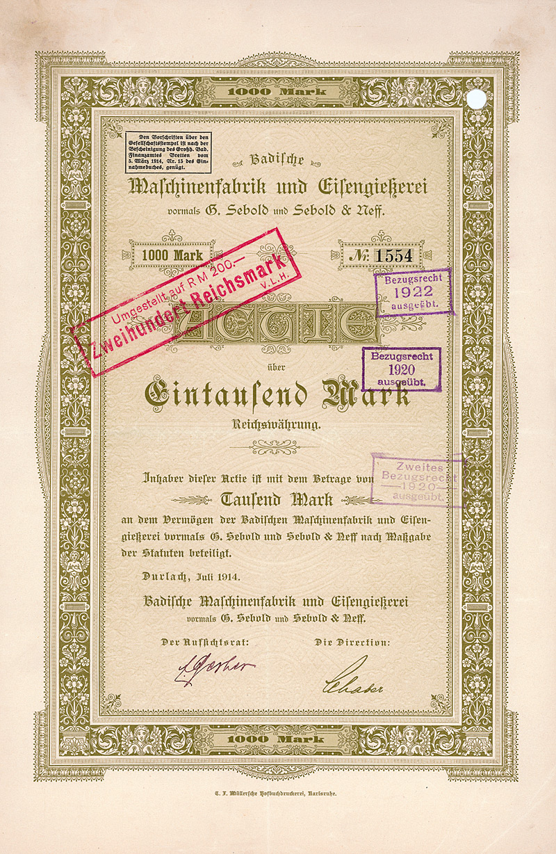 Aktie über 1000 Mark der Badischen Maschinenfabrik und Eisengießerei vom Juli 1914